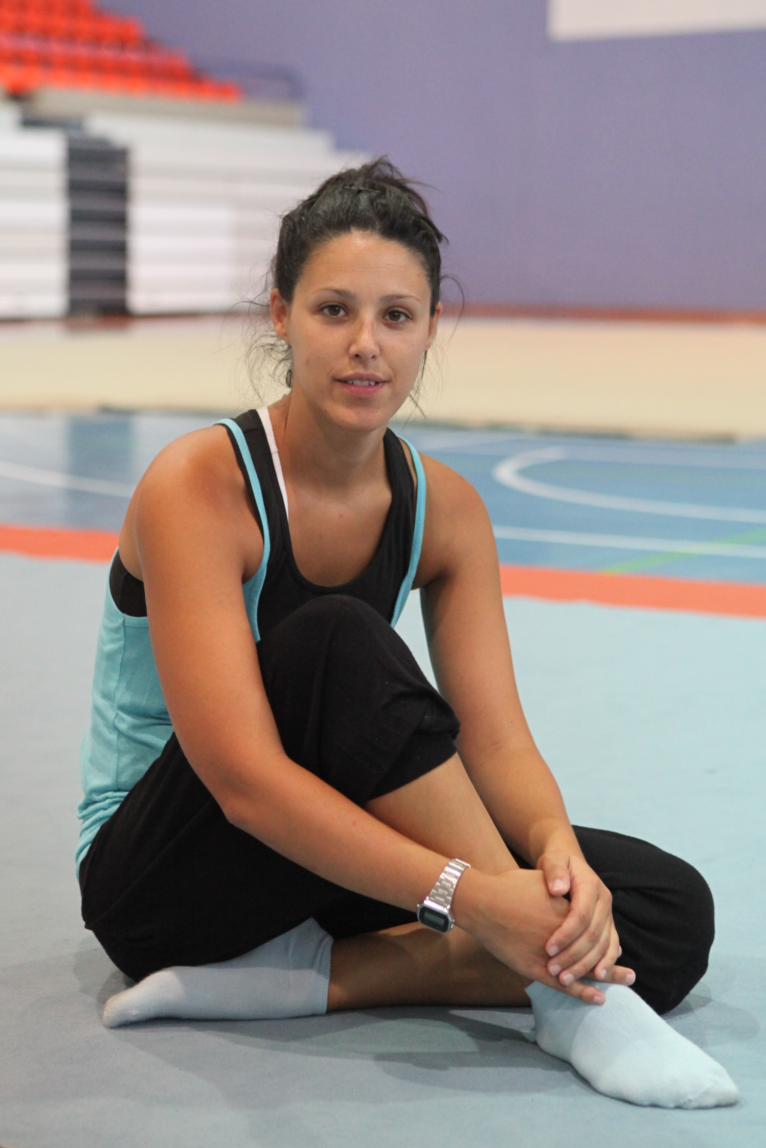 Tania Lamarca en el Poliesportiu Insular de Sa Blanca Dona (Ibiza) durante un campus del Club Gimnasia Rítmica Tanit en septiembre de 2013.